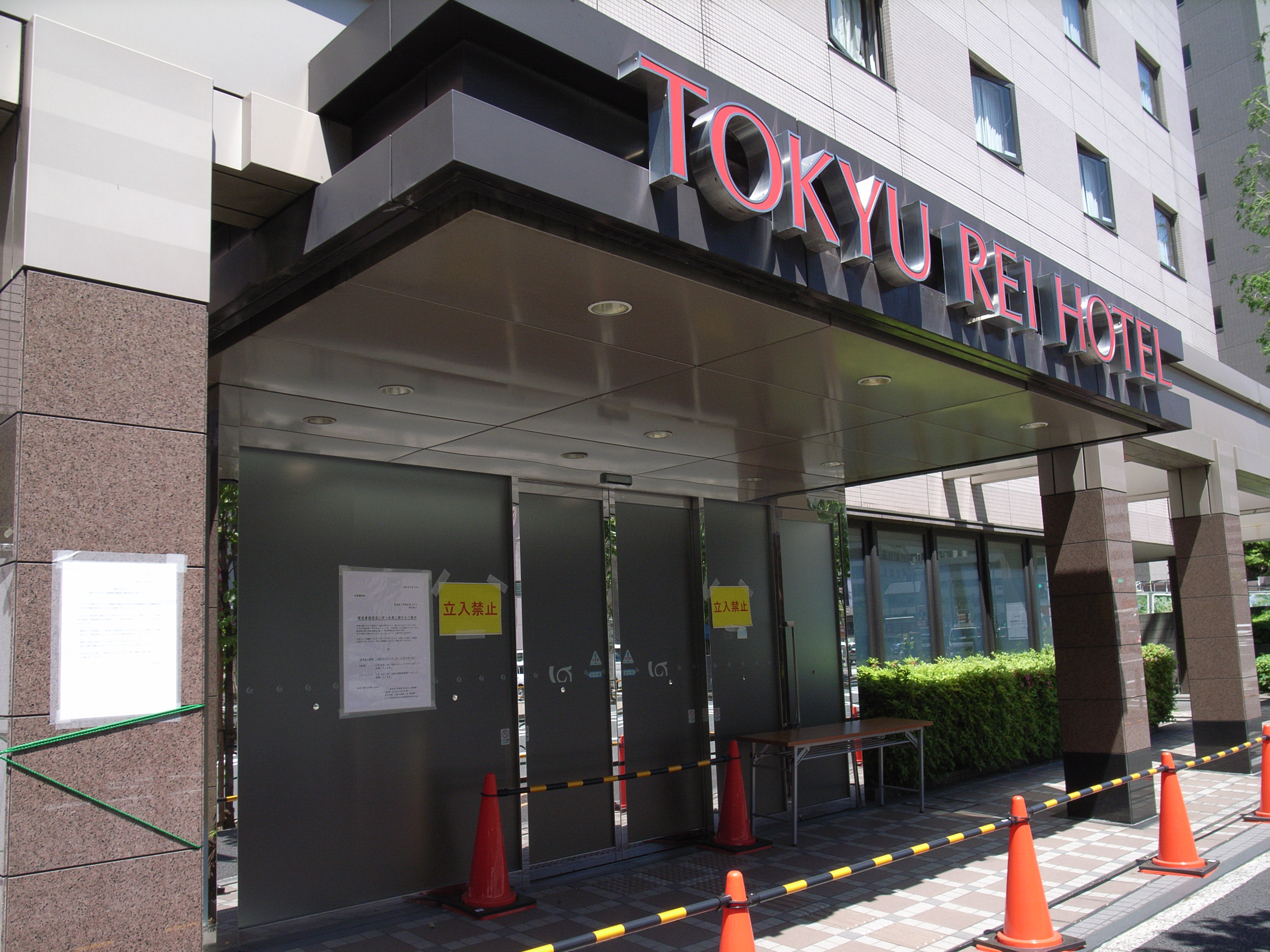 新型コロナウイルス感染軽症者を収容する虎ノ門東急REIホテル。